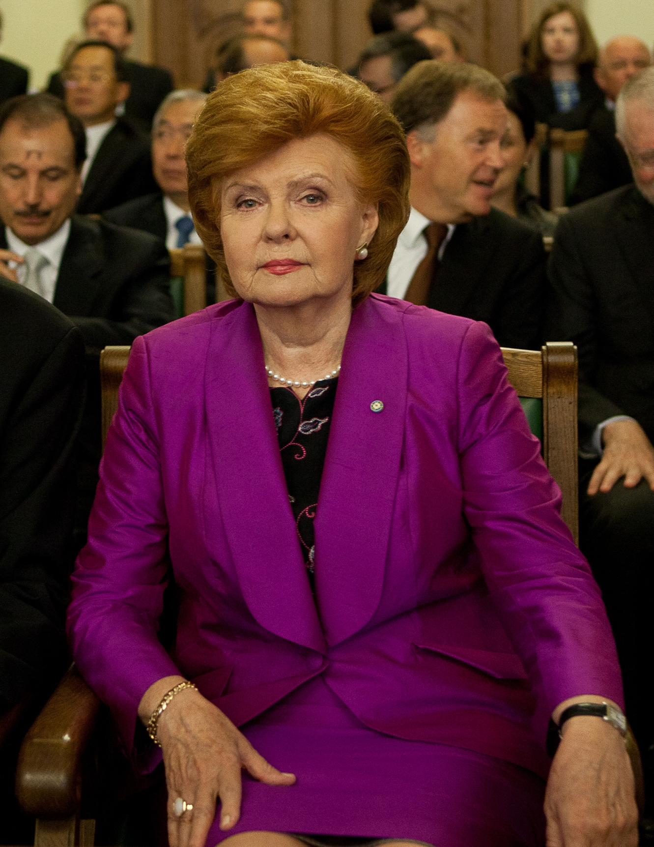 Valdis Zatlers and Vaira Vīķe-Freiberga 2011.gada 8.jūlijs. Saeimas ārkārtas sesijas sēdē, kurā Valsts prezidents Andris Bērziņš nodod svinīgo solījumu. Priekšplānā bijušie Valsts prezidenti Valdis Zatlers un Vaira Vīķe-Freiberga. Foto: Saeima